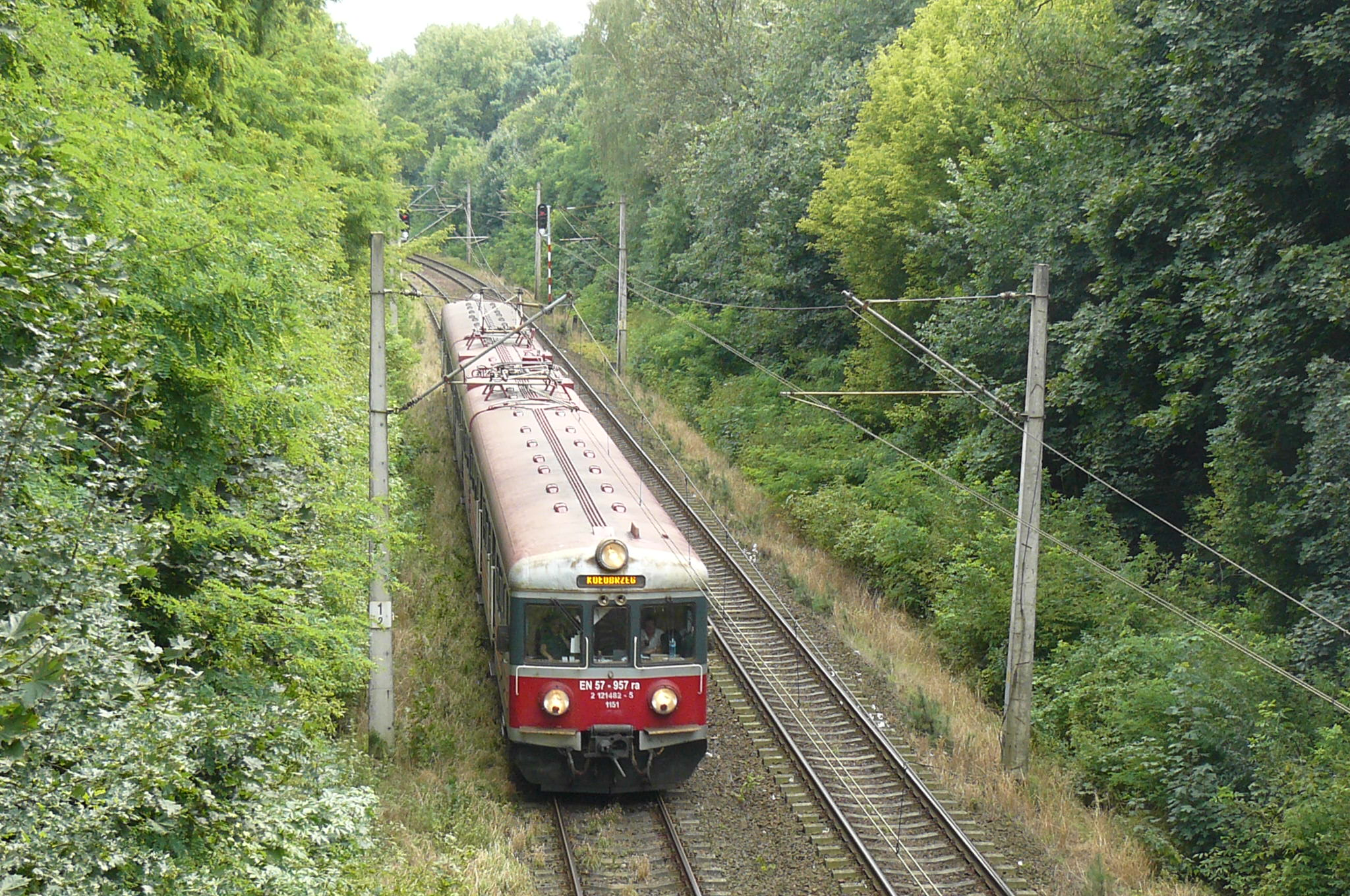 EN57-957 na Golęcinie w Poznaniu (jedzie do Kołobrzegu jako regionalny).